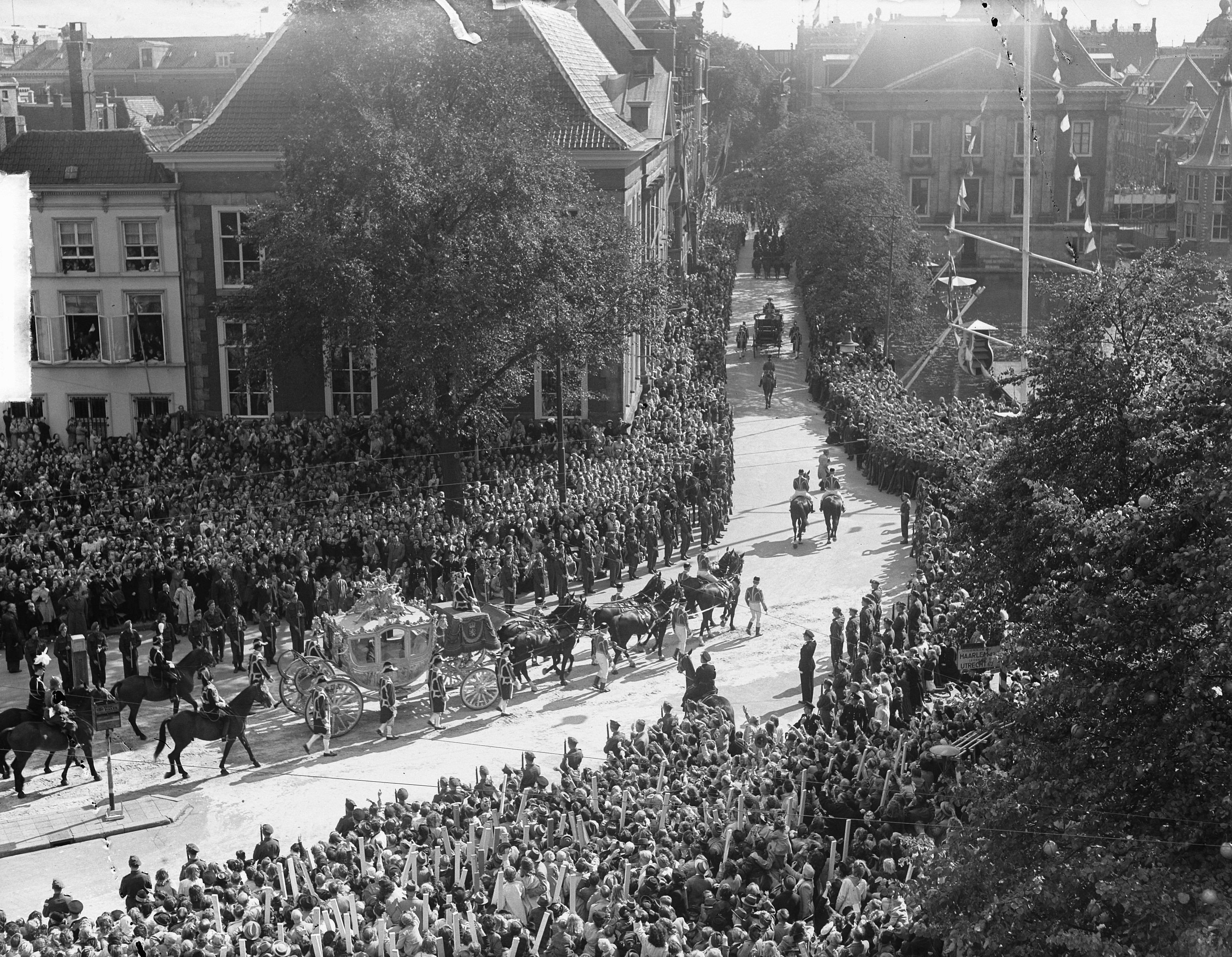 Collectie / Archief : Fotocollectie Anefo Reportage / Serie : Troonsafstand koningin Wilhelmina / Inhuldiging van koningin Juliana Beschrijving : Eerste Prinsjesdag met koningin Juliana als nieuwe vorstin. De Gouden Koets, hier op de hoek van de Korte Vijverberg in Den Haag, op weg naar de Ridderzaal. Datum : 21 september 1948 Locatie : Den Haag, Zuid-Holland Trefwoorden : koninklijk huis, prinsjesdagen, rijtoeren Fotograaf : Fotograaf Onbekend / Anefo Auteursrechthebbende : Nationaal Archief Materiaalsoort : Glasnegatief Nummer archiefinventaris : bekijk toegang 2.24.01.09 Bestanddeelnummer : 900-0149